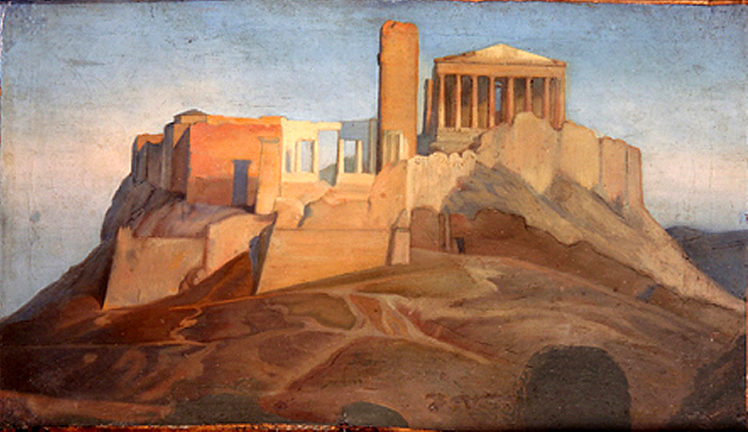 Vue de l'acropole d'Athènes - etude - Peinture à l'huile sur papier collé sur toile